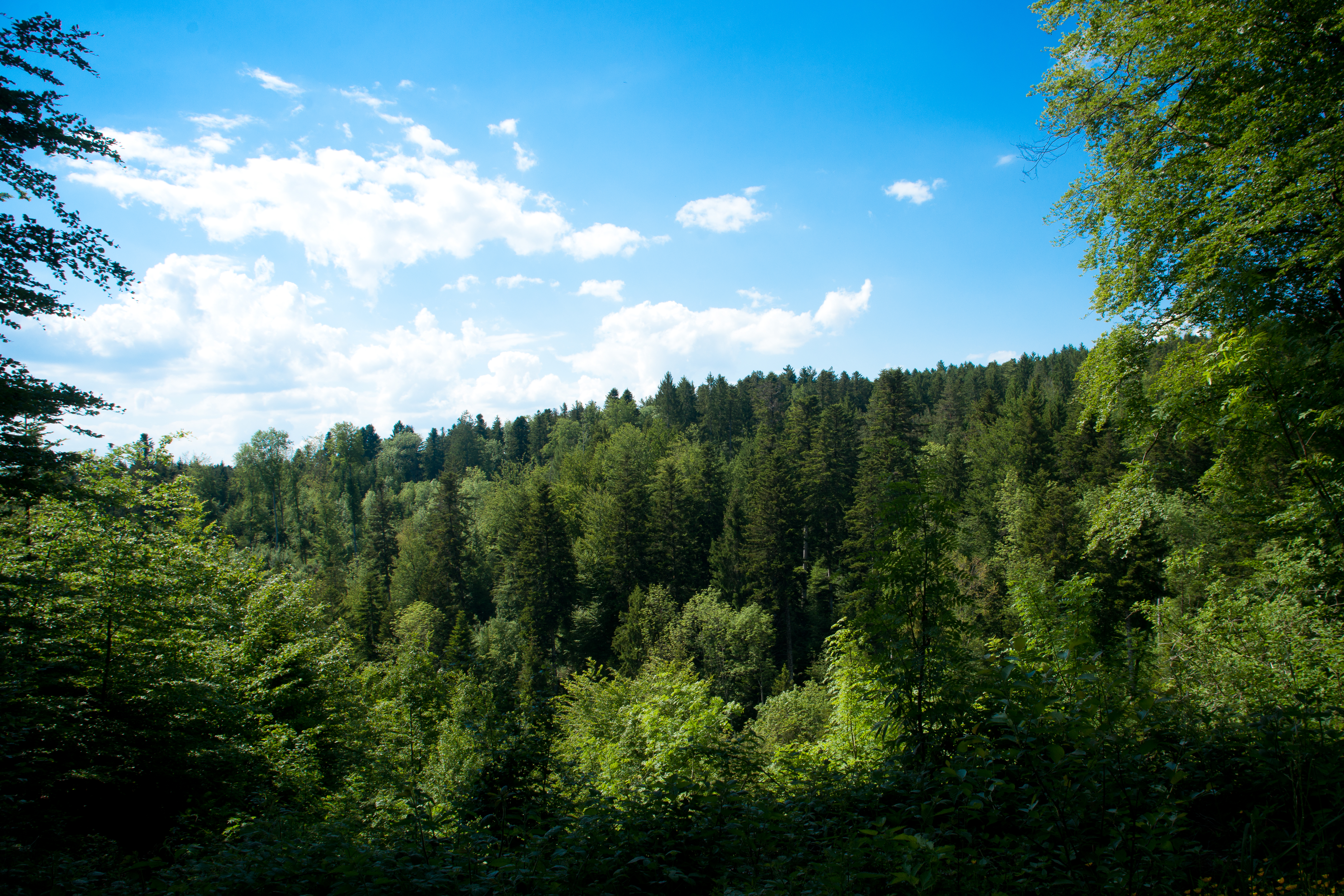 Bois de l'Erberey, Ecotaux, canton de Vaud, Suisse.